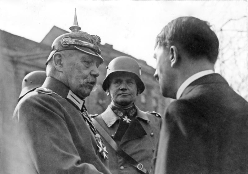 Der historische Tag von Potsdam am 21. März 1933. Reichspräsident von Hindenburg mit Reichskanzler Hitler und Reichswehrminister von Blomberg vor der Garnisonkirche in Potsdam